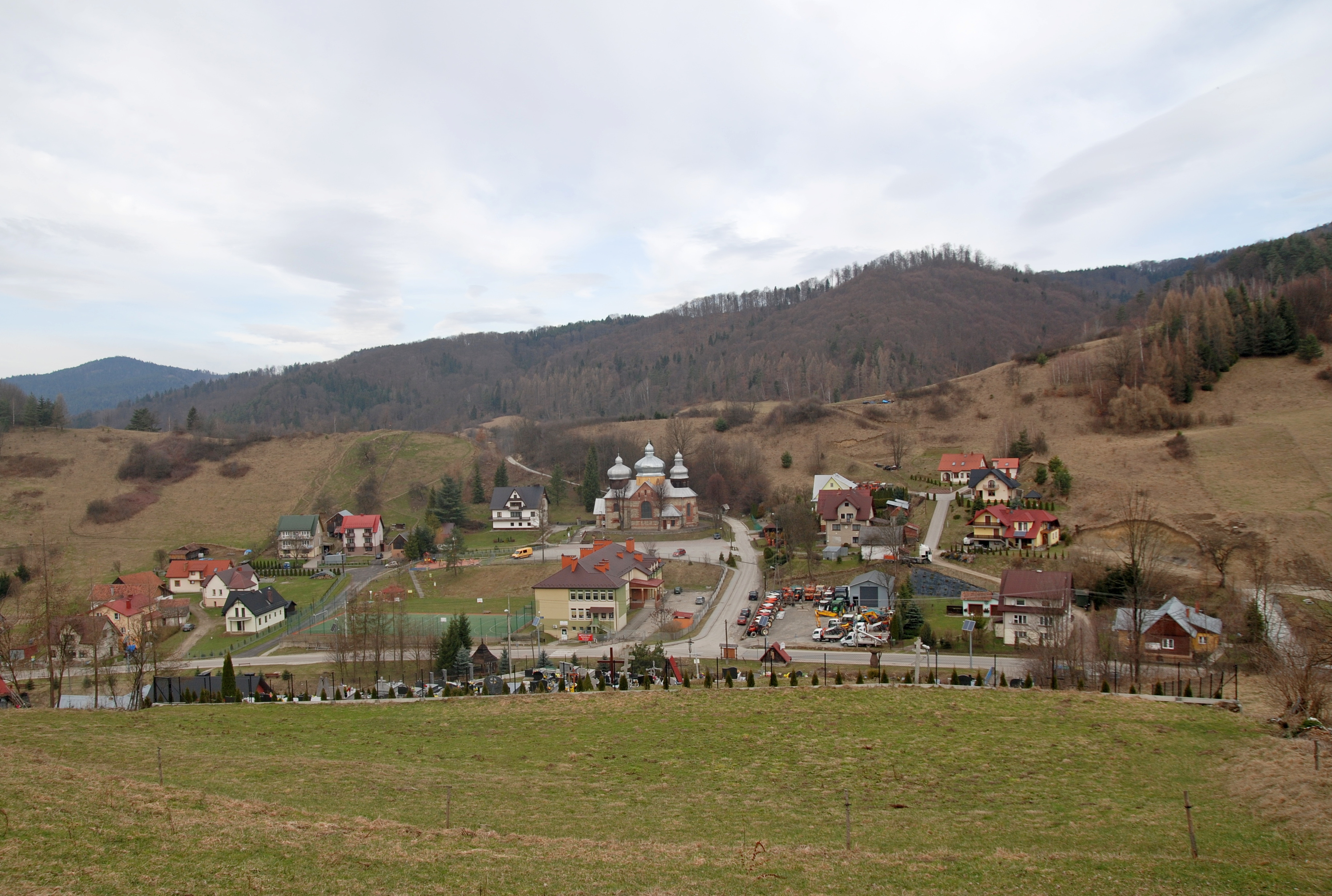 wieś Żegiestów